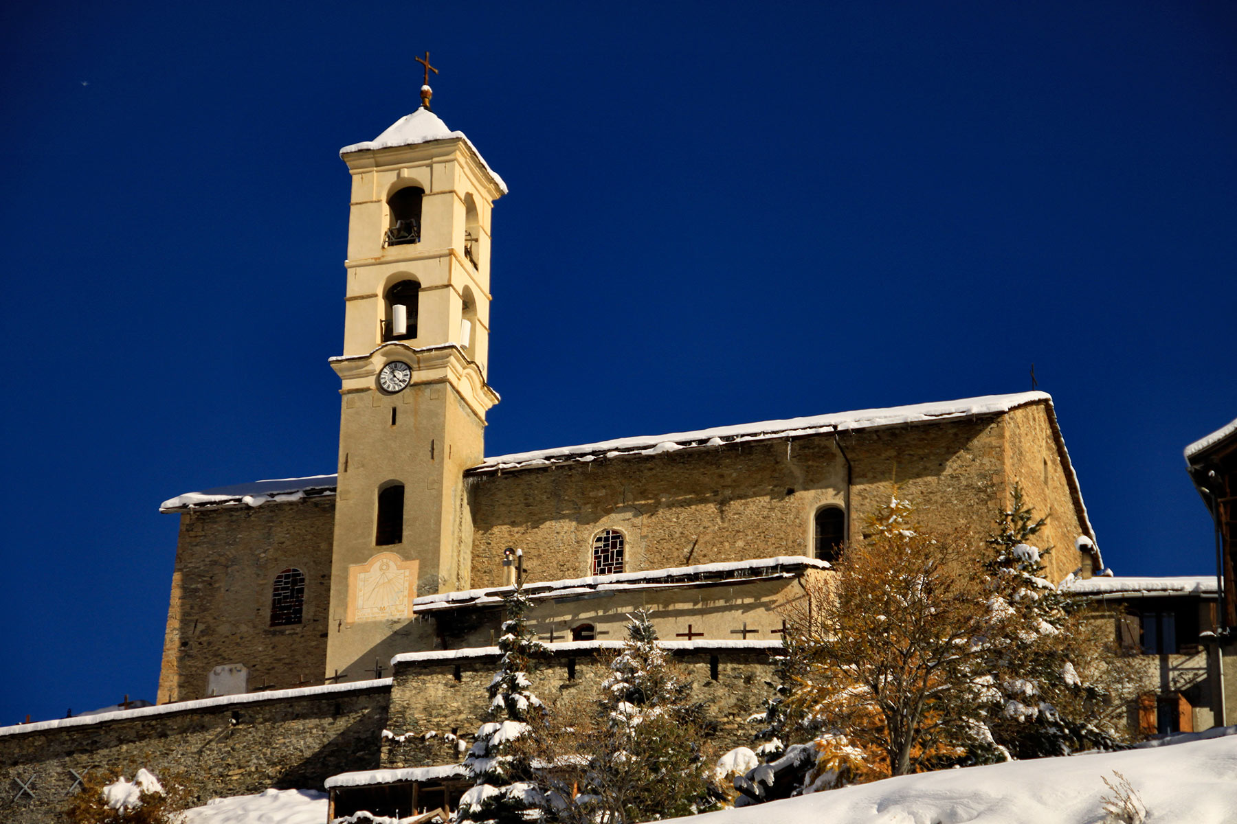 L'église de Saint-Véran, connue pour sa légende sur son dragon.